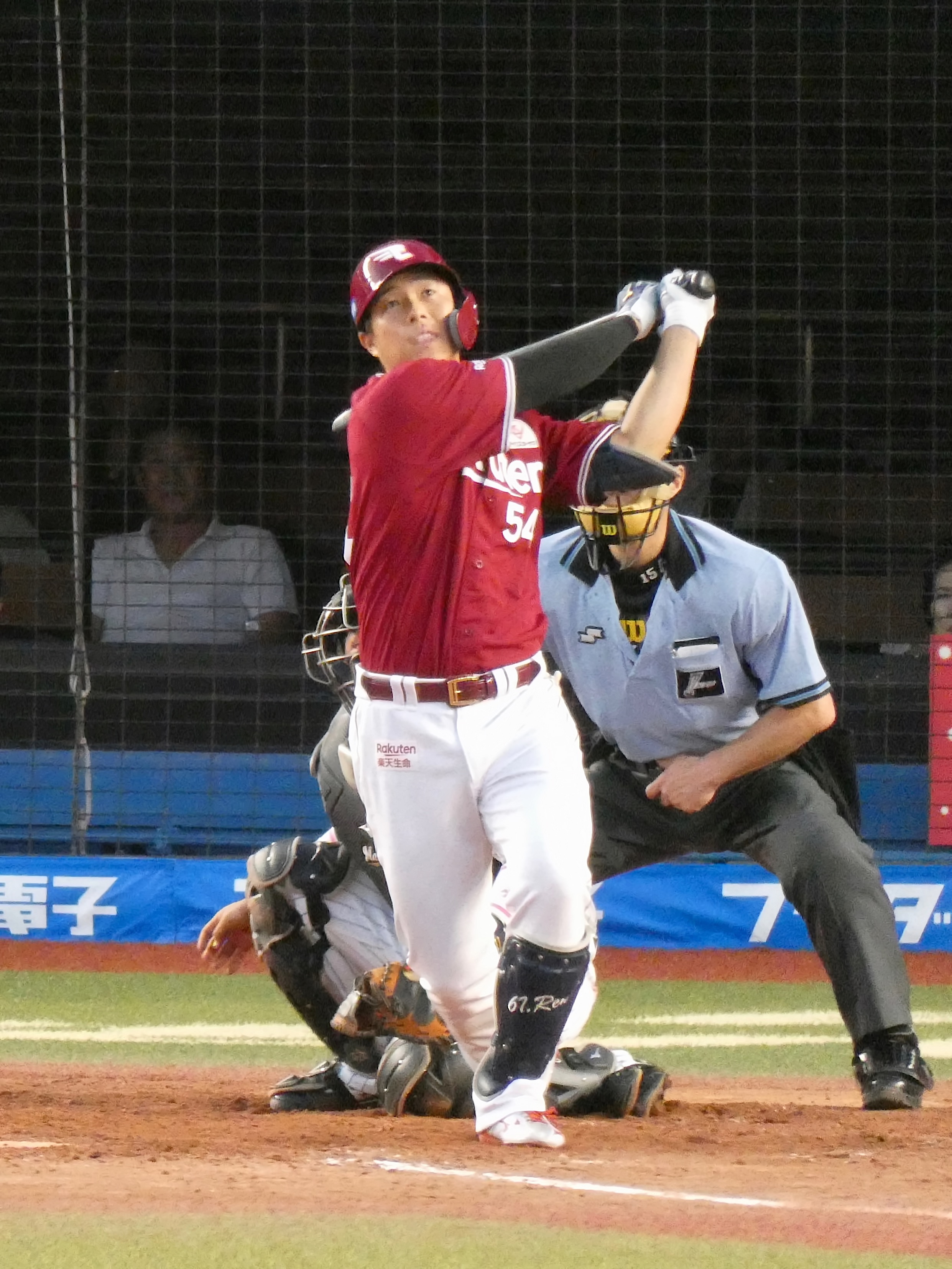 東北楽天ゴールデンイーグルスの選手「和田恋」。ZOZOマリンスタジアムにて。